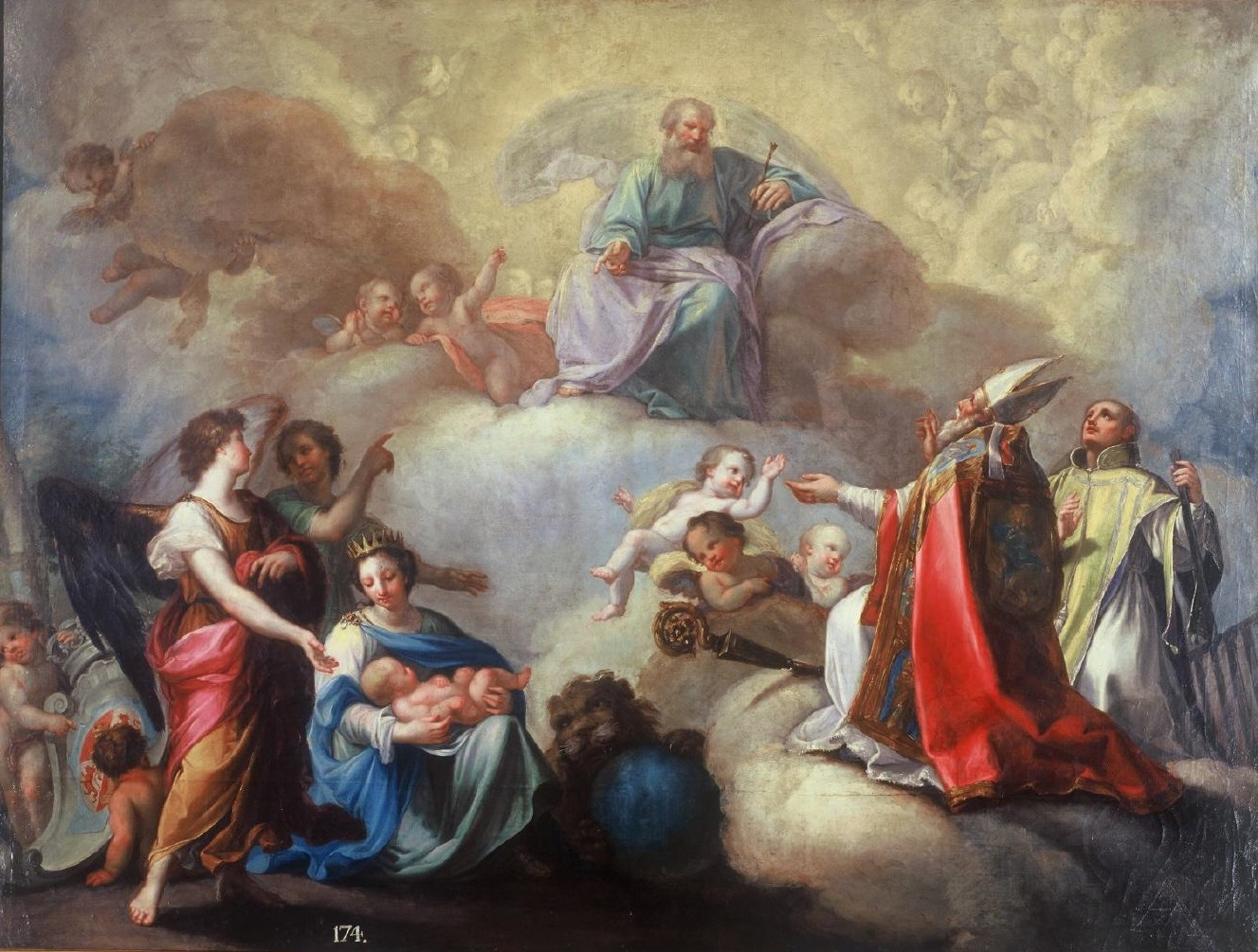 La obra es una alegoría del nacimiento del infante Carlos Clemente Antonio de Borbón (1771-1774), que fue el hijo primogénito del futuro rey Carlos IV de España.